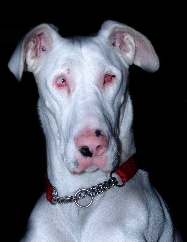 Deutsche Dogge (Doggen-Mix), die reinerbig (homozygot) für das Merle-Gen ist und dadurch eine Fehlbildung der Augen (Augenwachstum) aufweist.